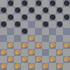 Zelfgemaakt en rechtenvrij diagrammetje